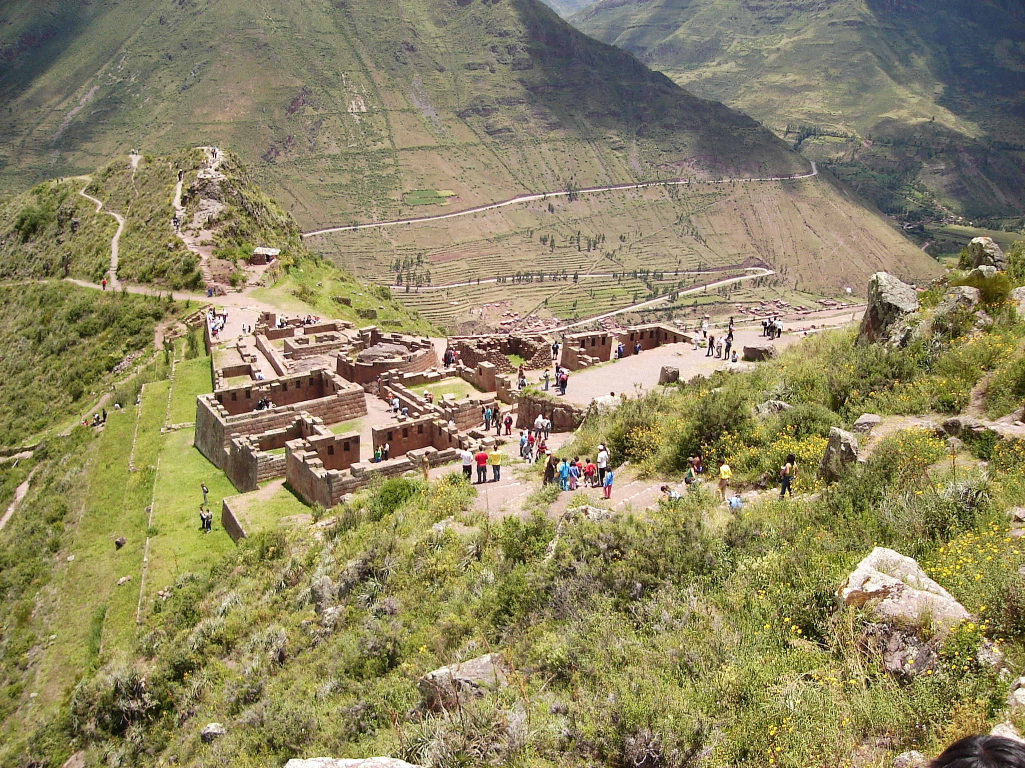 Foto tirada por mim, em Pisac.